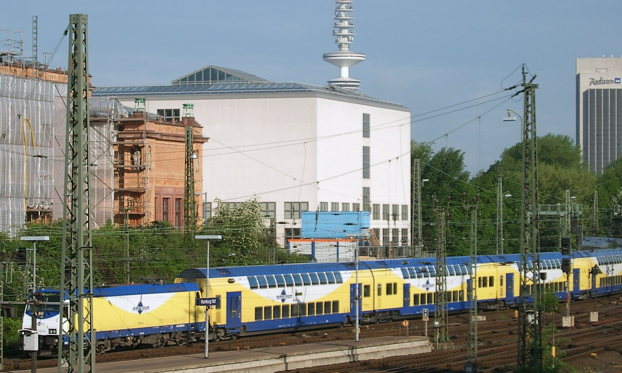 Hamburg, Bahn metronom vor Einfahrt in den Hauptbahnhof Hamburg. Im Hintergrund ist die Kunsthalle mit Altbau und Galerie der Gegenwart zu sehen. This is a photograph of an architectural monument., no. 390